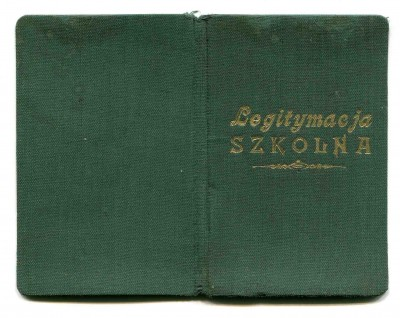 Беларуская (тарашкевіца): Пасведчаньне вучаніцы Маладэчанскай гімназіі імя Тамаша Зана